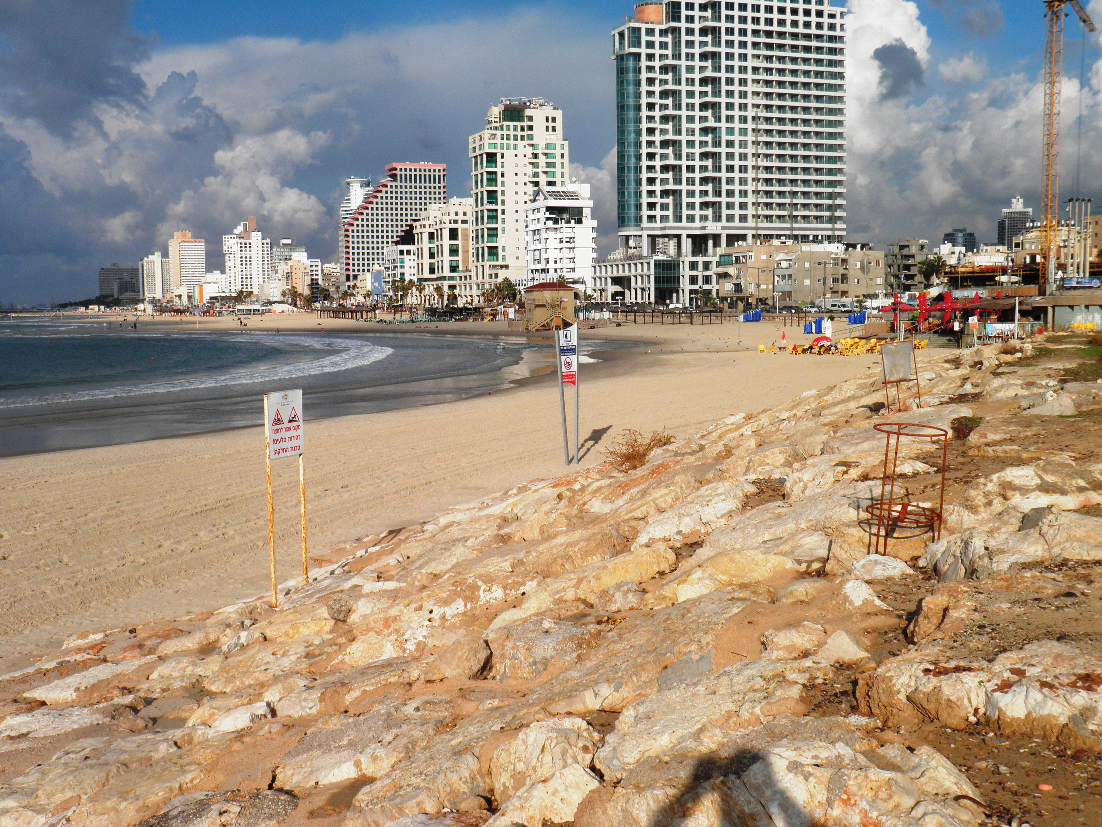 חוף המתופפים מאחורי הדולפינריום בתל אביב